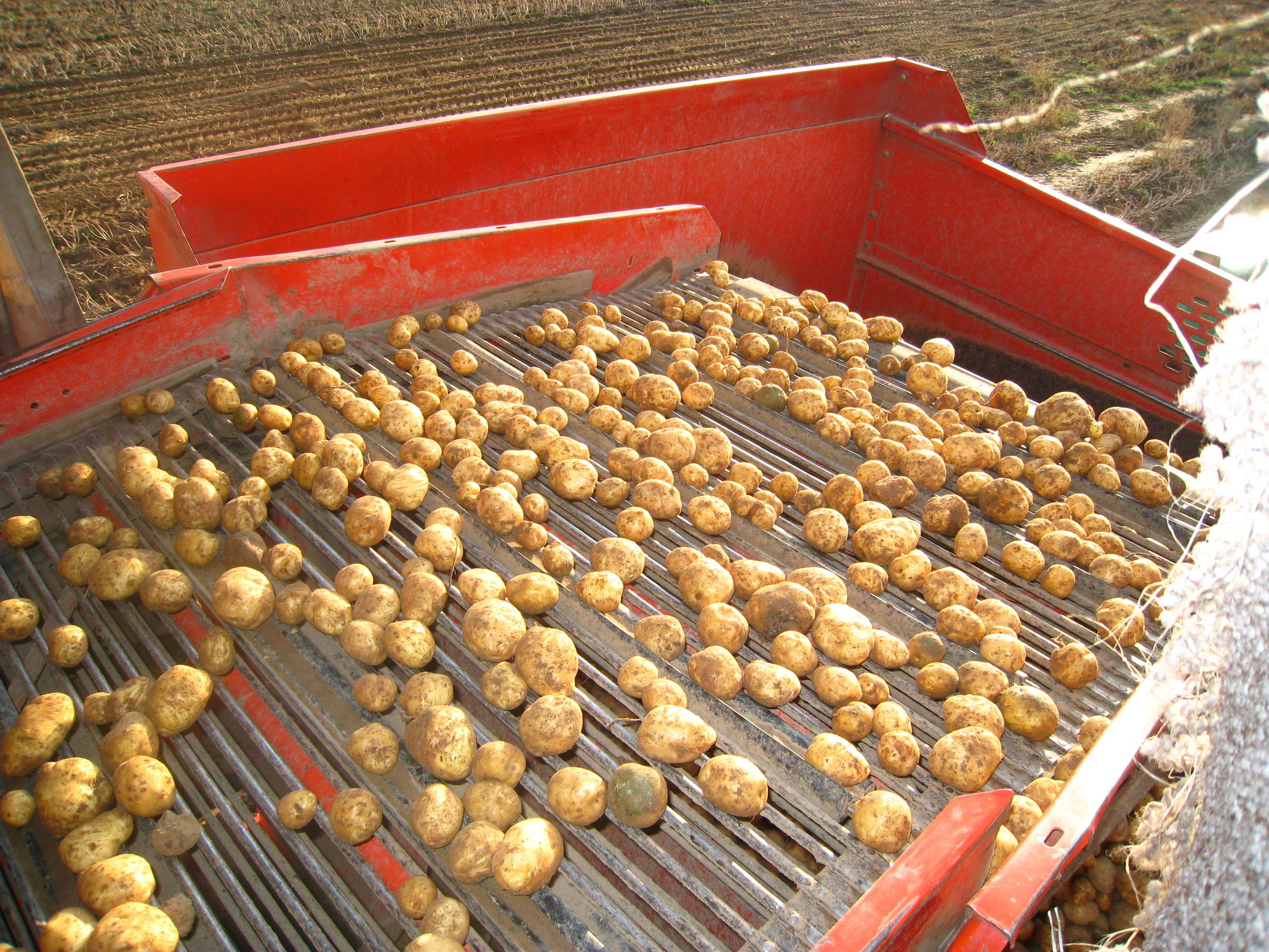 Amflora-Ernte im Feldversuchsanbau in Bütow 2009: Amflora ist die erste gentechnisch optimierte Pflanze, die seit 1998 in der EU eine kommerzielle Anbau-Zulassung erhalten hat. 2010 werden Amflora-Kartoffeln in Bütow für die kommerzielle Saatgutproduktion angebaut.